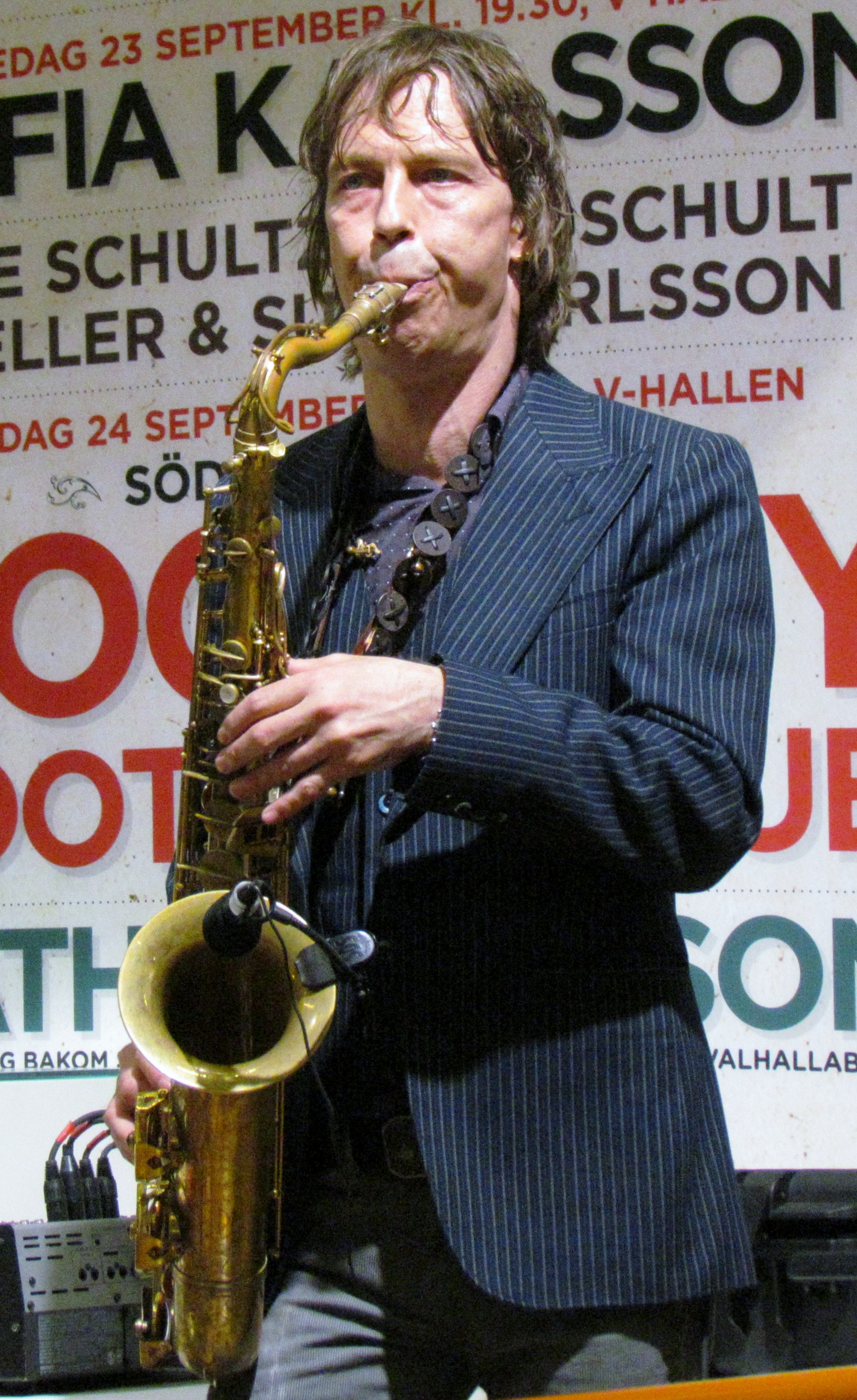 Saxofonisten Mats "Magic" Gunnarsson under ett uppträdande med Idde Schultz och Sören "Sulo" Karlsson.